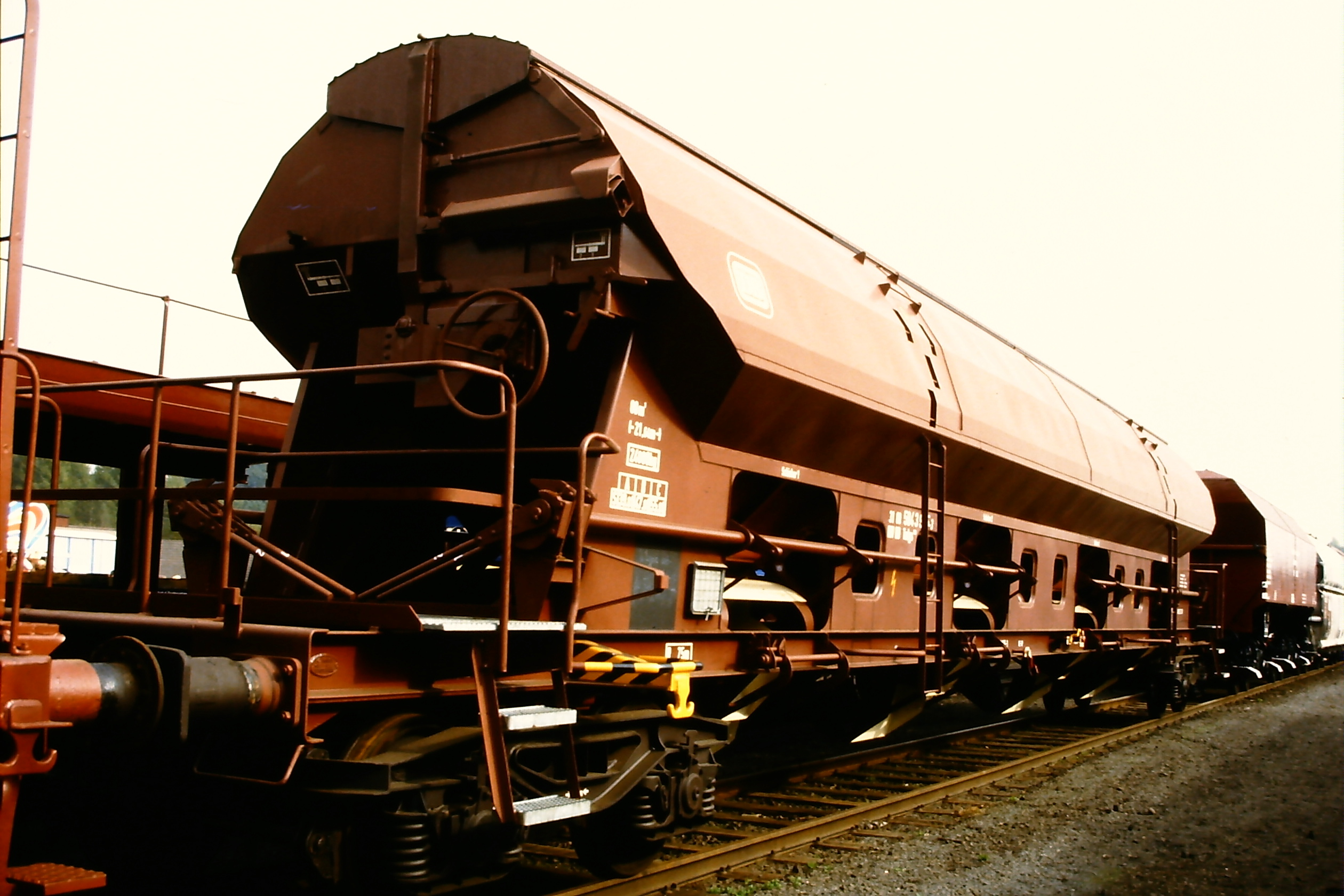 Seitenentladewaggon mit Dach Tadgs959, ausgestellt auf der Fahrzeugschau 150 Jahre deutsche Eisenbahn in Bochum-Dahlhausen